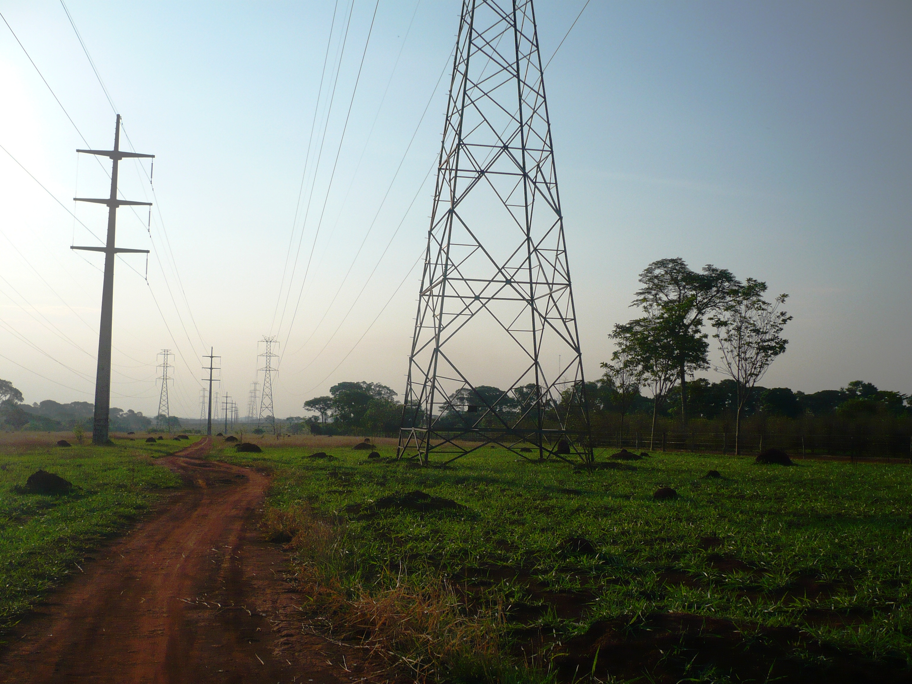 Goiânia, Bairro Vale dos Sonhos próxima à barragem João Leite